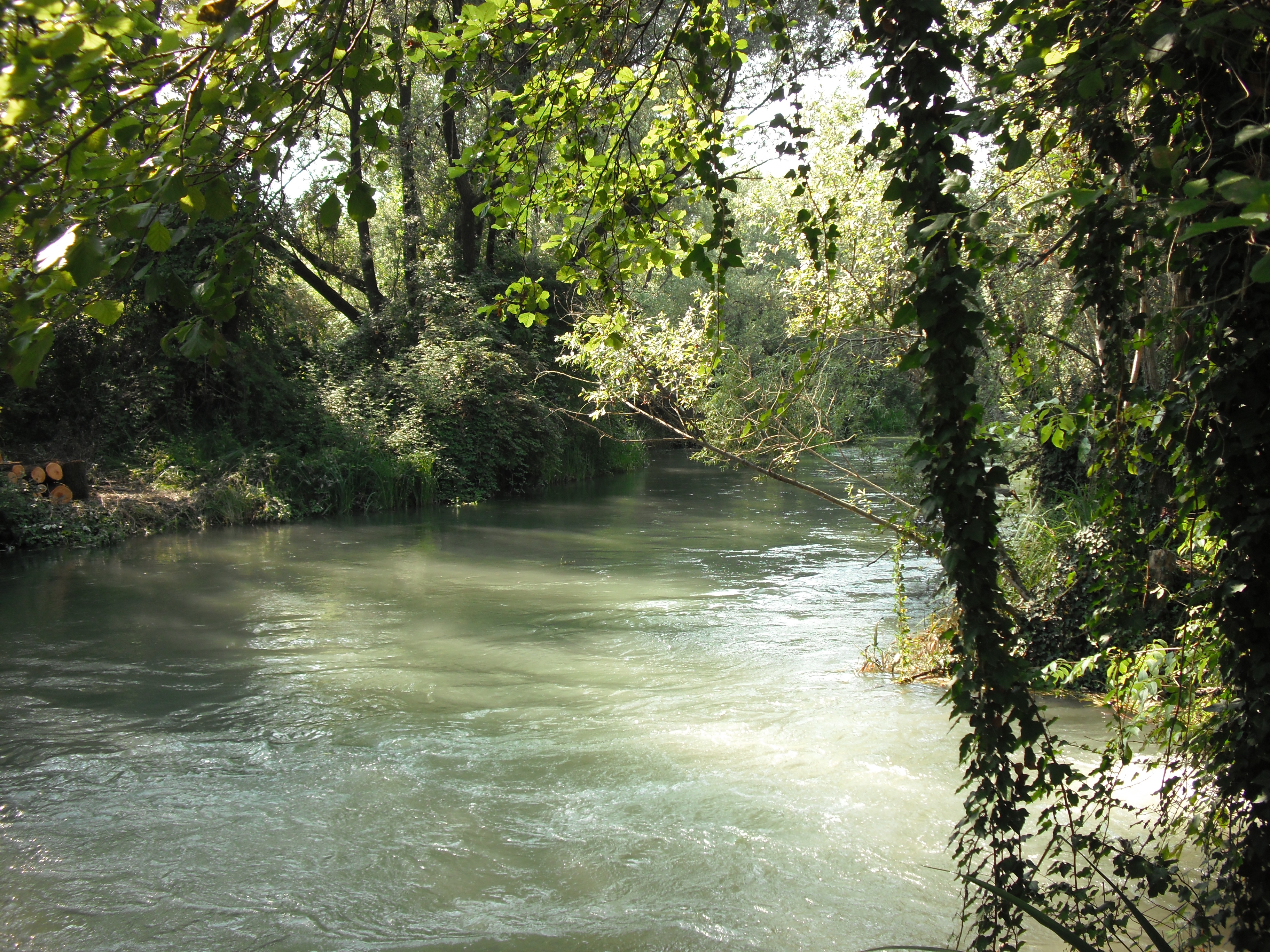 Il Sile poco prima di Santa Cristina.